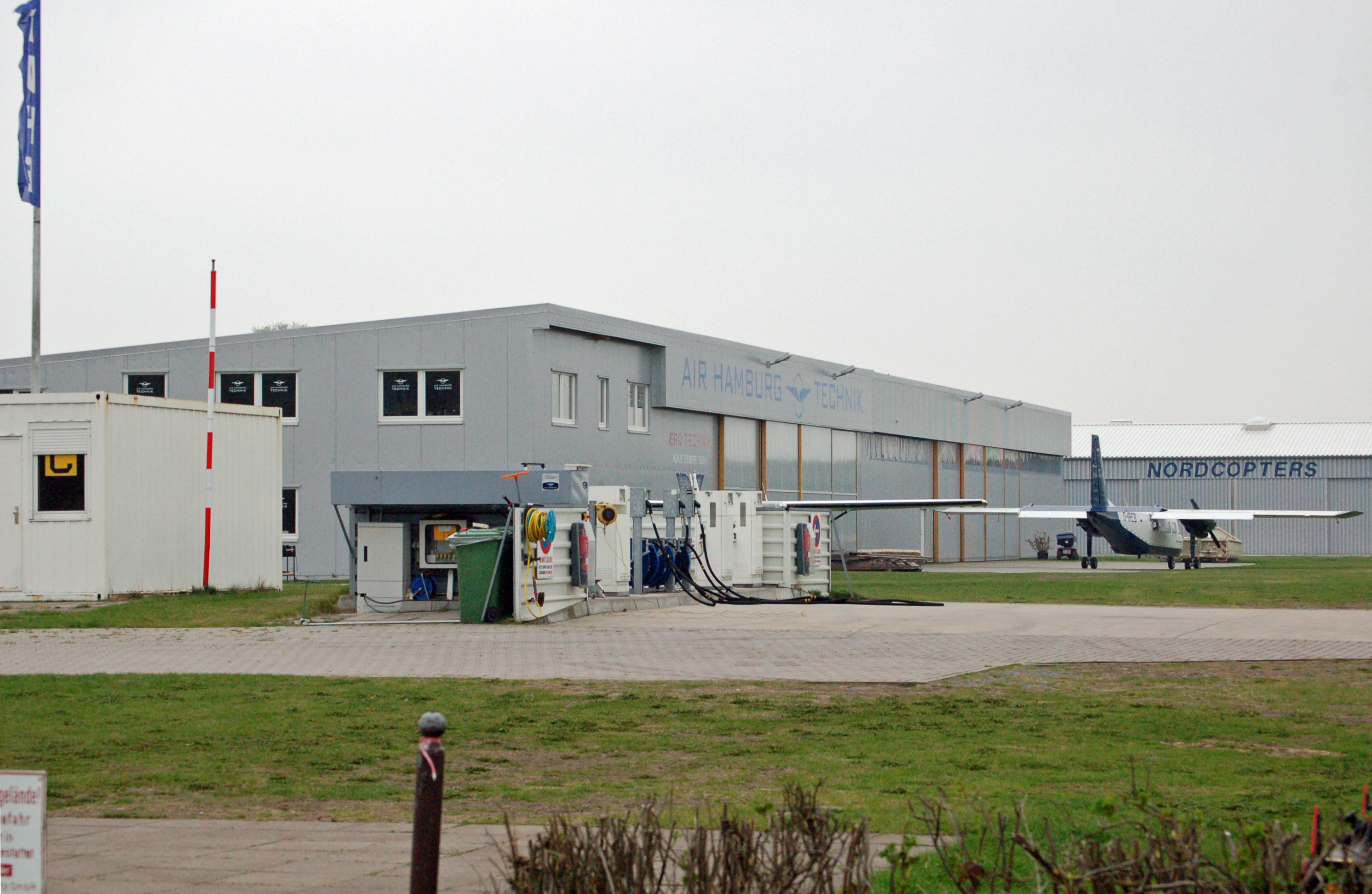 Der Technikhanger von Air Hamburg auf dem Gelände des Flugplatzes Uetersen